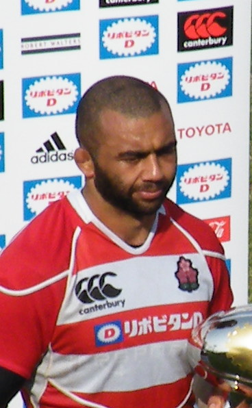 日本-イタリア戦後のリーチ・マイケル選手（2014年6月21日、東京・秩父宮ラグビー場）